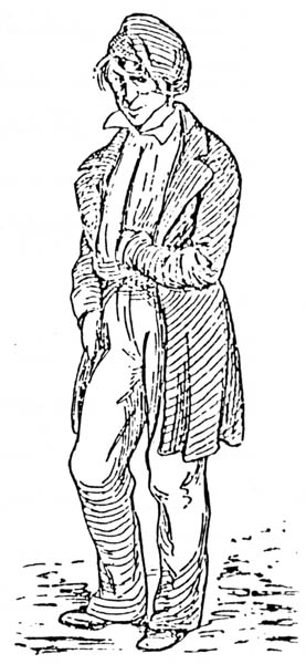 Handwerksbursche, Zeichnung aus dem Programmheft der Rinnsteinlieder